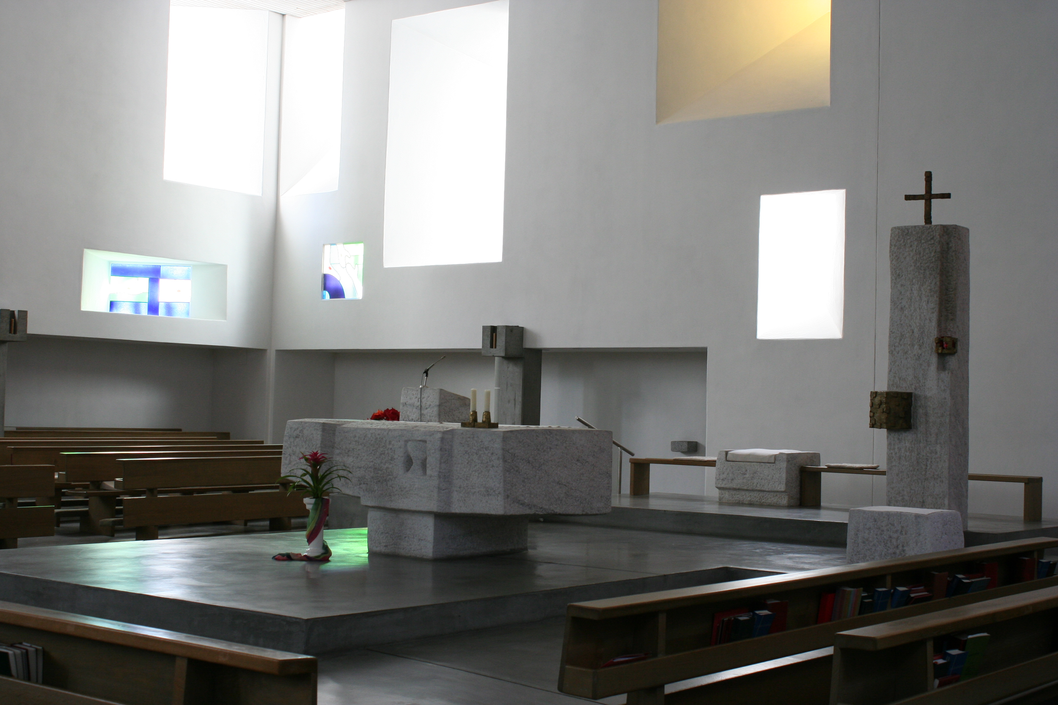 Kloster Ilanz Kirche innen